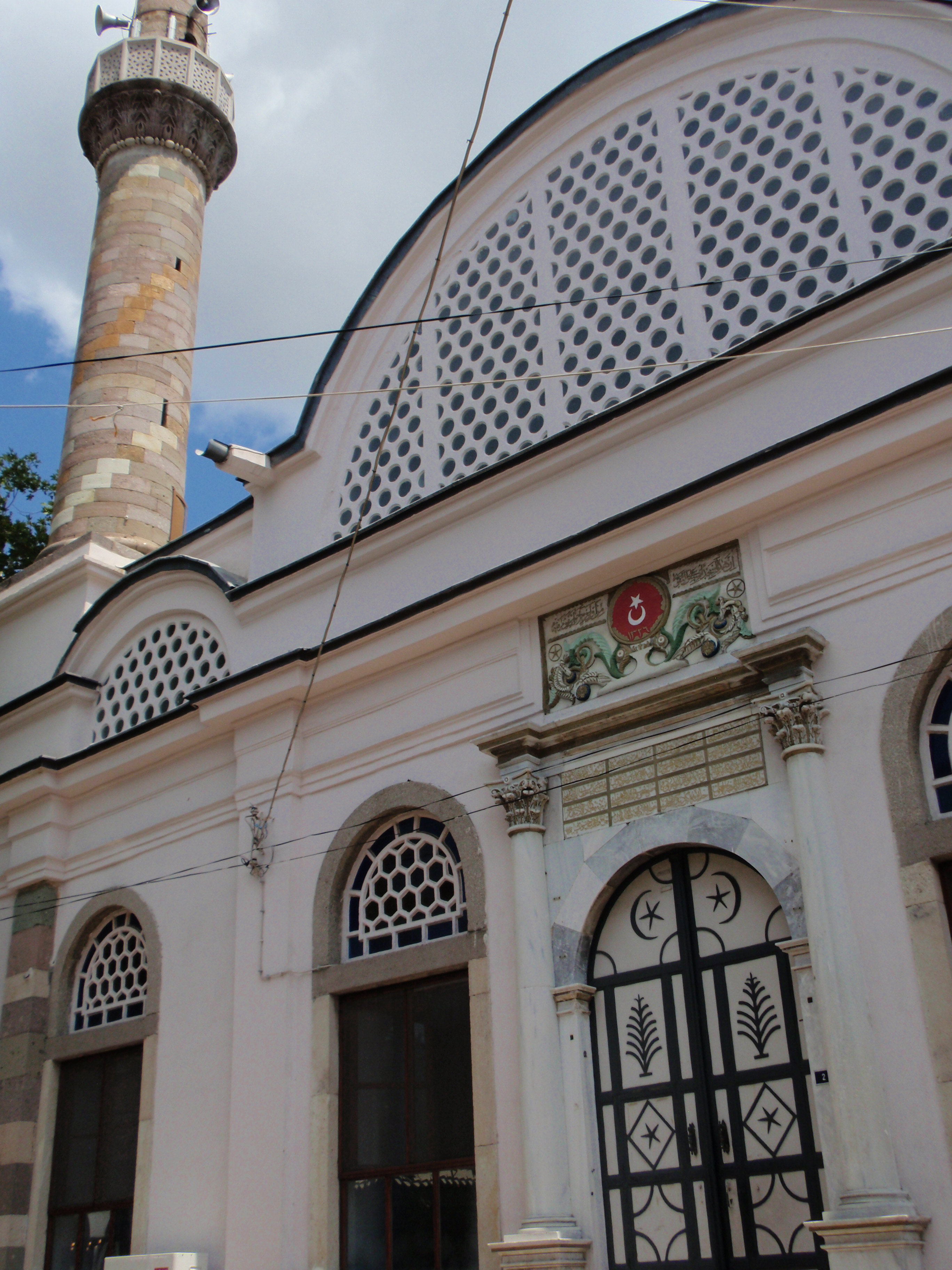 Burhaniye Koca Cami